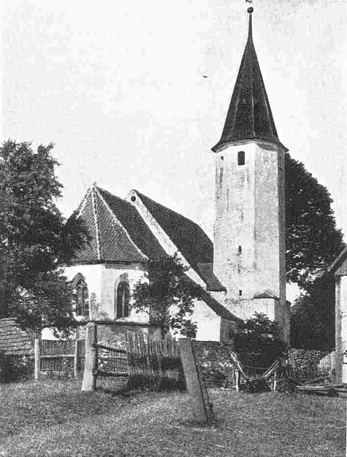 St. Sebastian, erbaut 1420. Spätgotische Kirche in Kittensee, Bayern. Abrissdatum unbekannt.